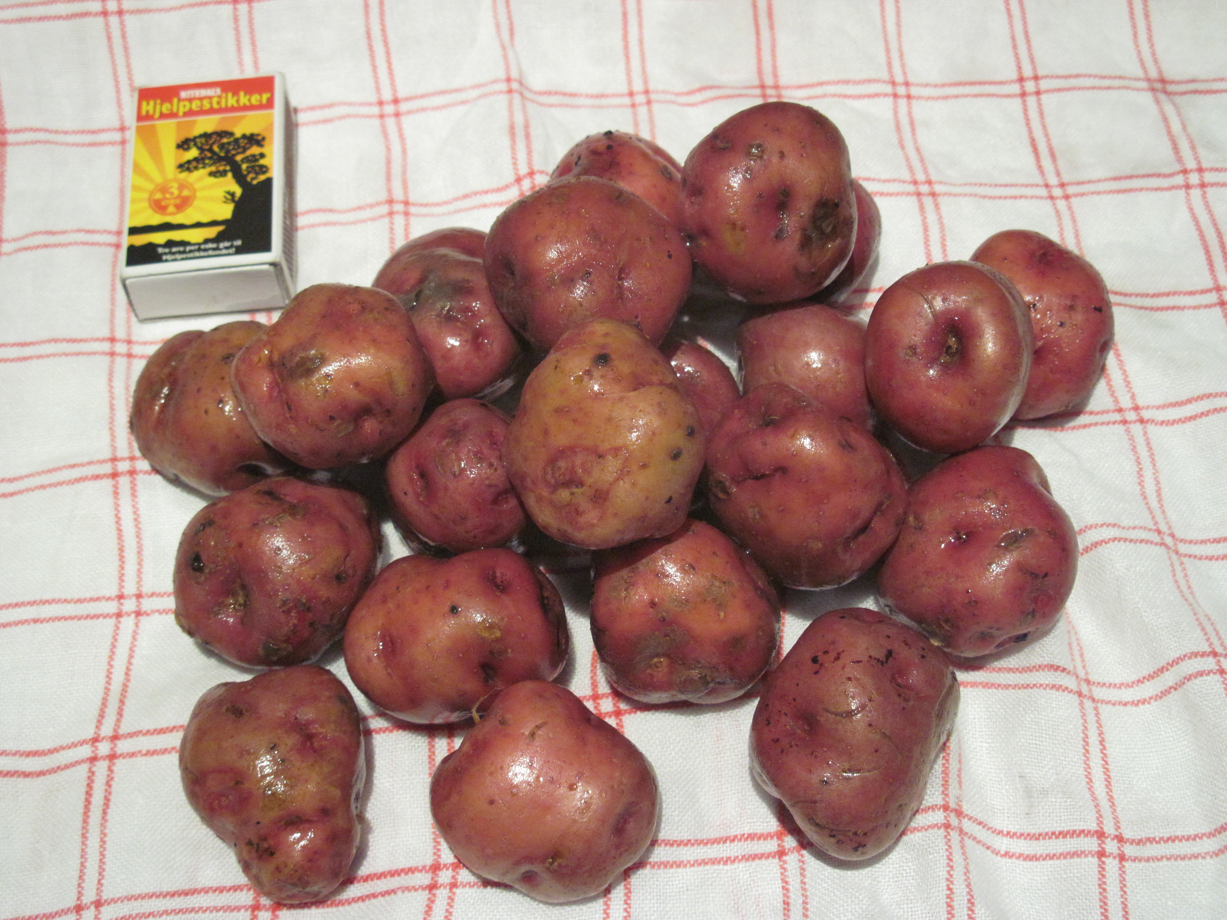 Ringerikspoteter vist med en fyrstikkeske for å angi størrelse